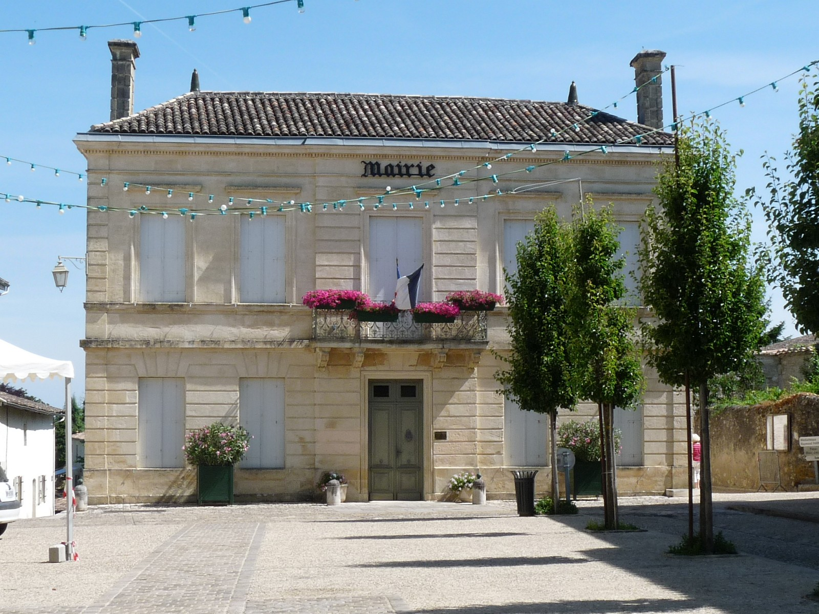 Mairie de Gensac, Gironde, France